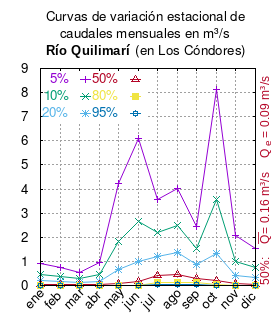 caudales medios mensuales por probabilidad de excedencia para el río Quilimarí en Los Condores. # Dirección General de Aguas. Ministerio de Obras Públicas # Evaluación de la explotación máxima sustentable de aguas subterráneas. Cuenca del Río Quilimarí. # # año 2008 # Tabla 5 Probabilidades de excedencia con sus respectivos caudales mensuales, pág.18 mes 5% 10% 20% 50% 80% 95% ene 0.92 0.47 0.21 0.04 0.01 0.00 feb 0.76 0.39 0.17 0.04 0.01 0.00 mar 0.54 0.28 0.13 0.03 0.01 0.00 abr 0.96 0.45 0.18 0.03 0.01 0.00 may 4.23 1.83 0.66 0.10 0.01 0.00 jun 6.08 2.67 0.99 0.15 0.02 0.00 jul 3.58 2.20 1.22 0.40 0.13 0.04 ago 4.03 2.47 1.37 0.44 0.14 0.05 sep 2.43 1.54 0.88 0.31 0.11 0.04 oct 8.11 3.57 1.32 0.20 0.03 0.00 nov 2.08 1.00 0.41 0.07 0.01 0.00 dic 1.52 0.75 0.32 0.06 0.01 0.00